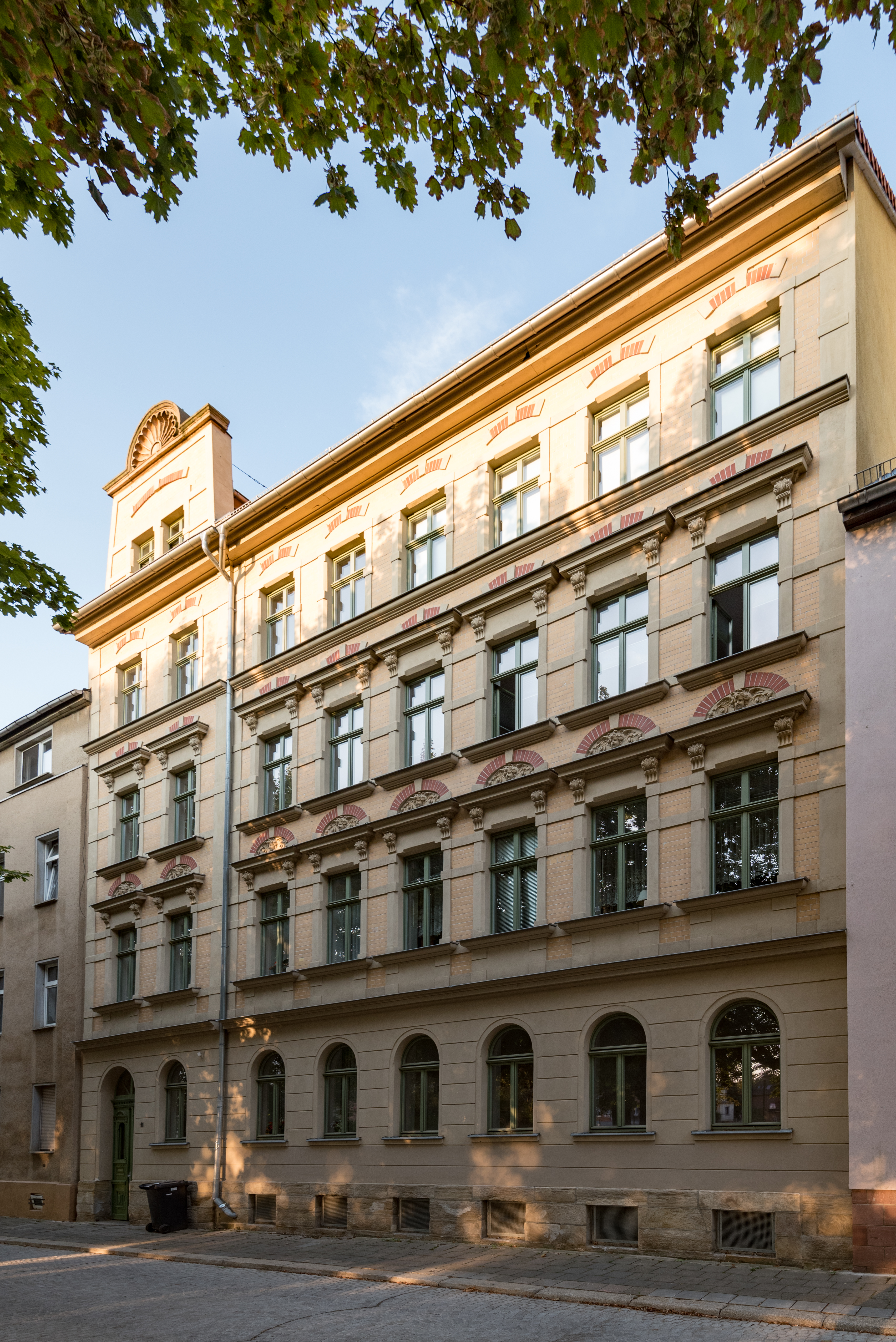 Weißenfels, Neue Straße 11